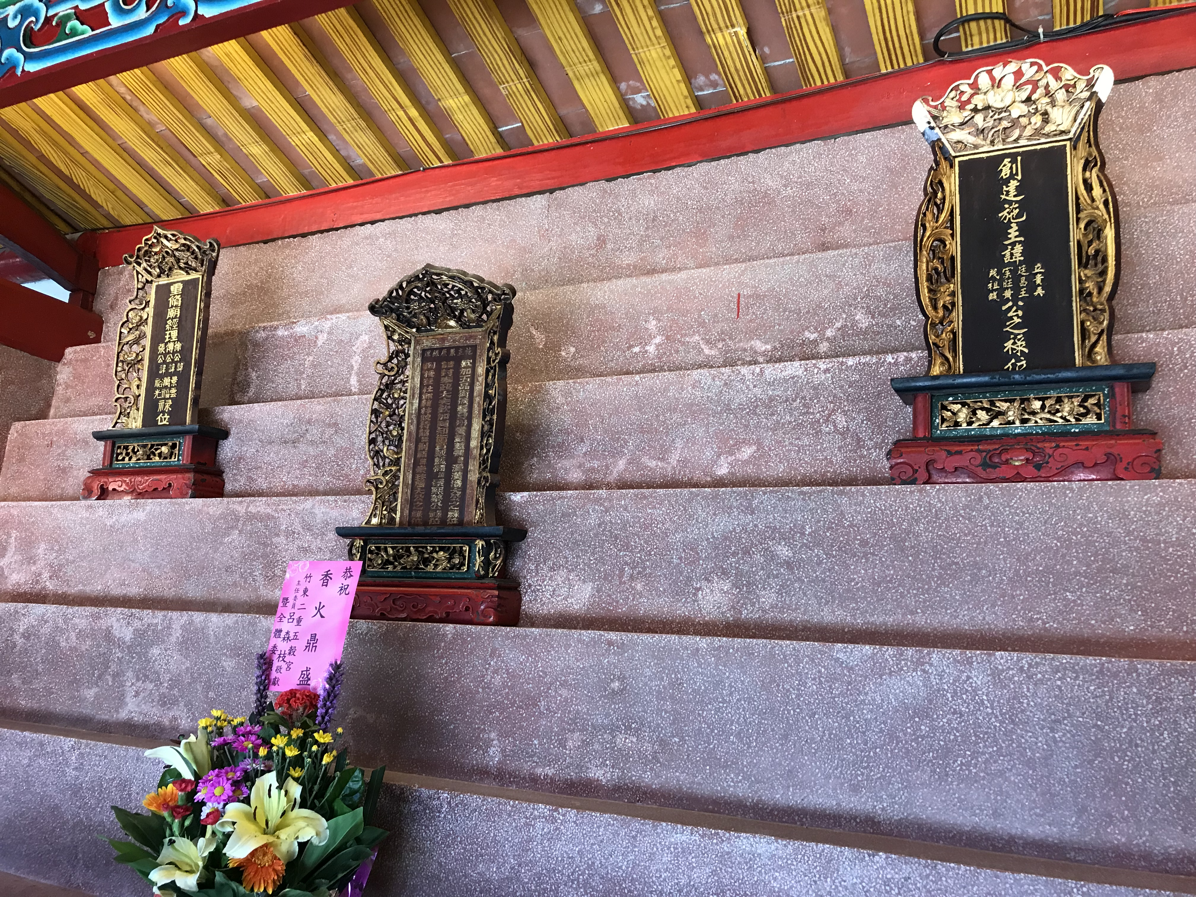 褒忠亭義民廟祿位